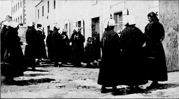 Ouessant : Femmes attendant le courrier (des lettres de leurs maris marins) à la poste de Lampaul en 1898 (Paul Gruyer, Ouessant, Enez Heussa, l'île de l'Epouvante, dessin de Massias